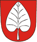 znak obce